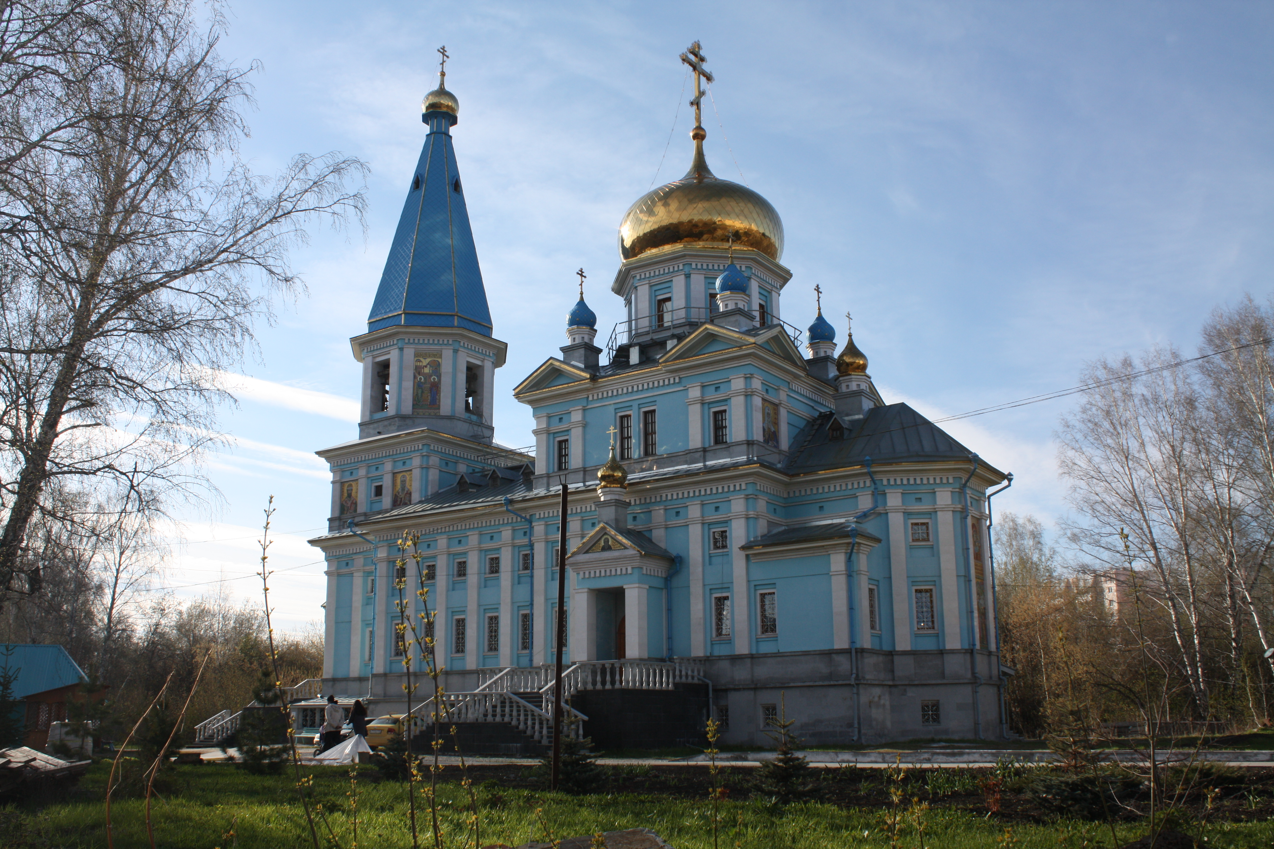 Сергиево-Казанский храм, Западная улица, Краснообск, Новосибирская область.